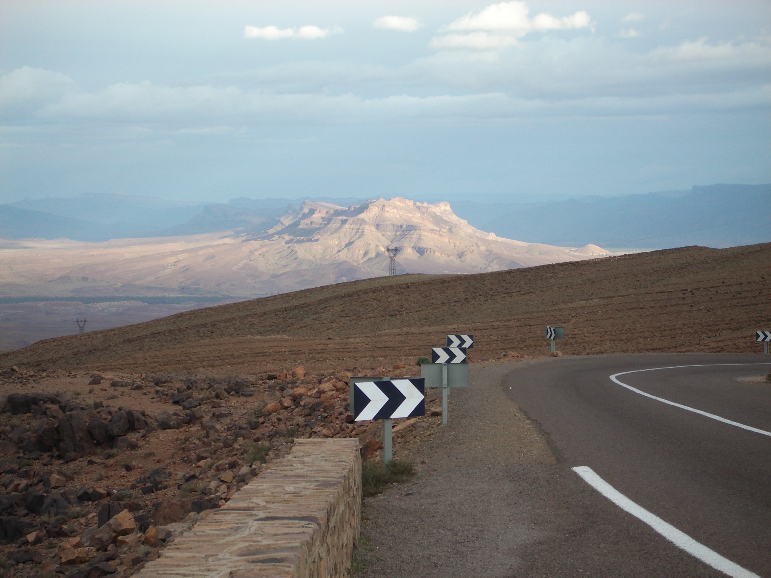 Le djebel Kissane dominant la ville d'Agdz, vu depuis le djebel Tifernine